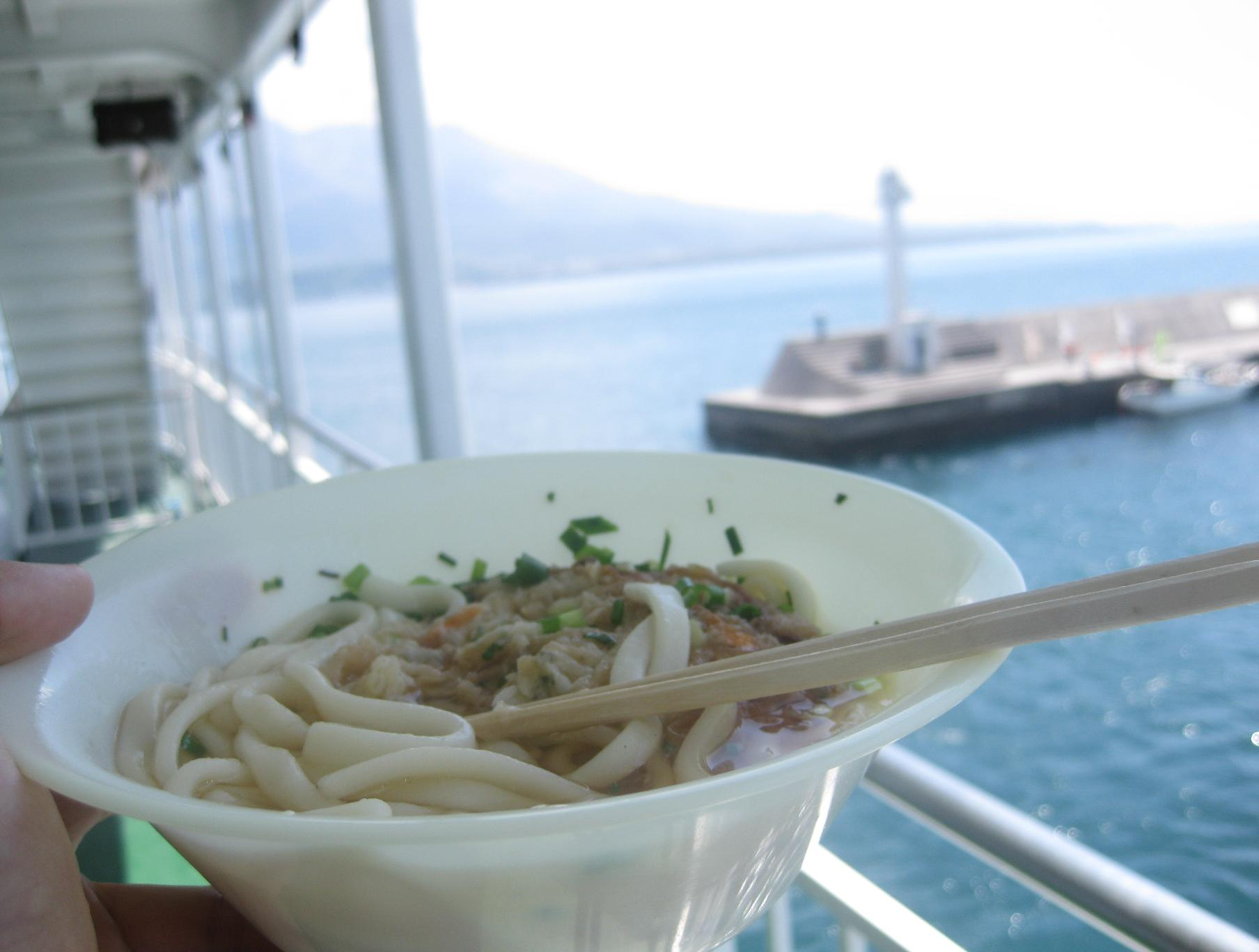 Udon sold at Sakurajima Ferry